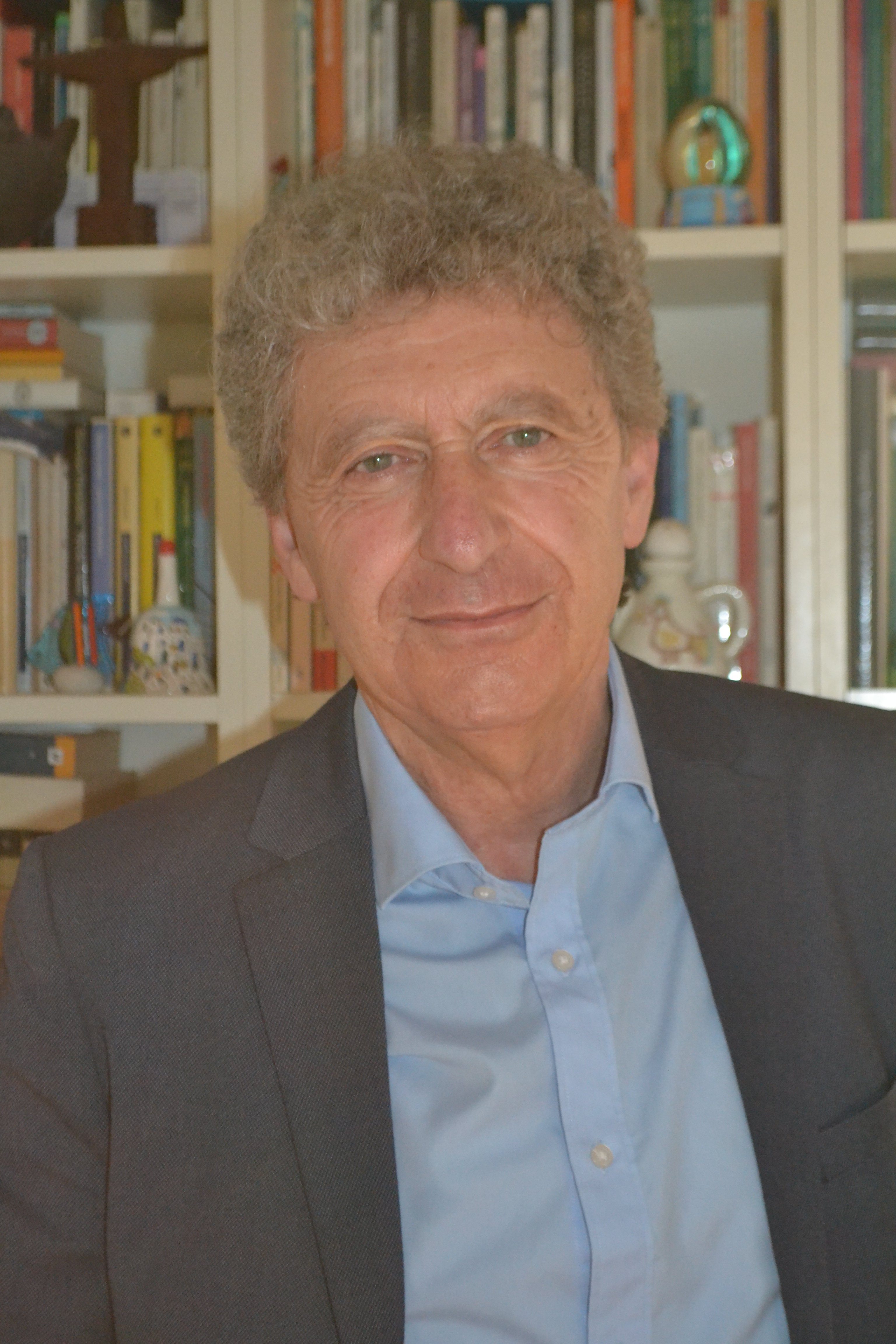 Foto dello scrittore Vincenzo Esposito